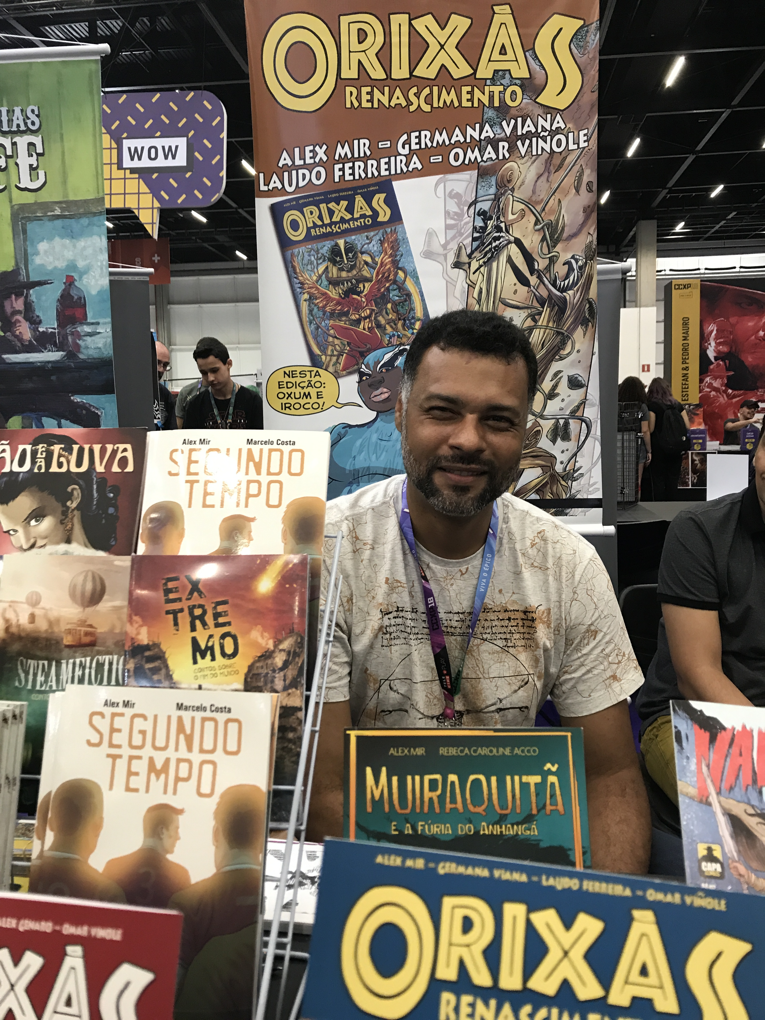 Artista Alex Mir na edição de 2018 da Comic Con Experience.